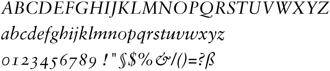 schriftartenmuster der sabon italic